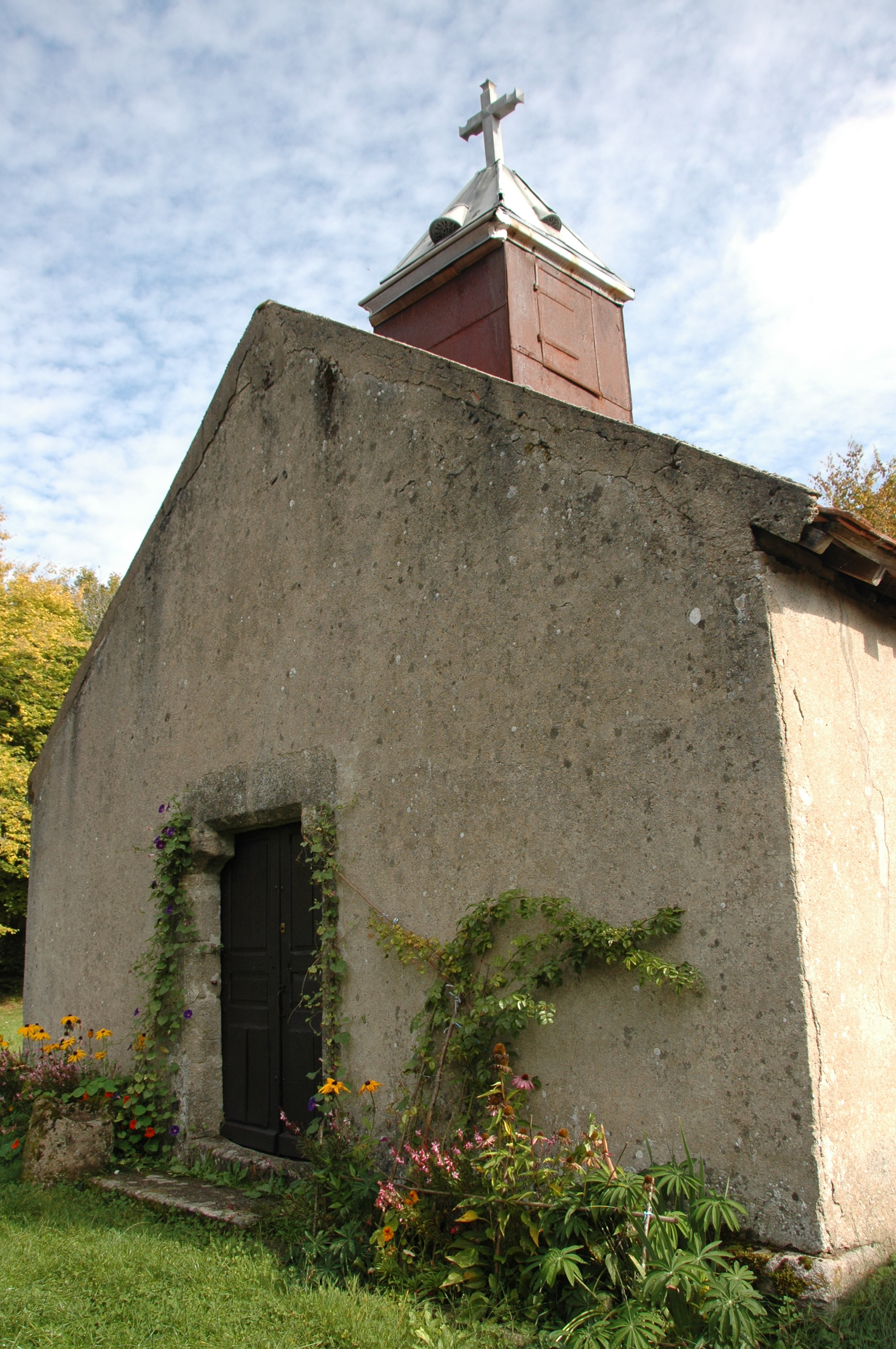 Chapelle faite édifiée en 1675 par Françoise de Rabutin-Chantal